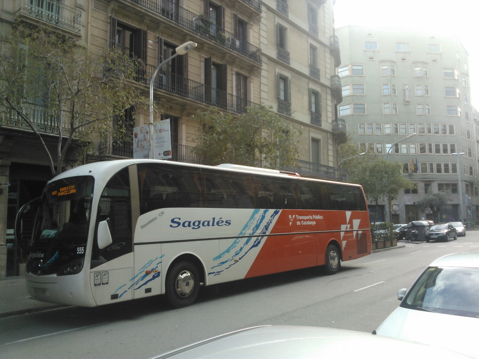 Autobús interurbà a Barcelona